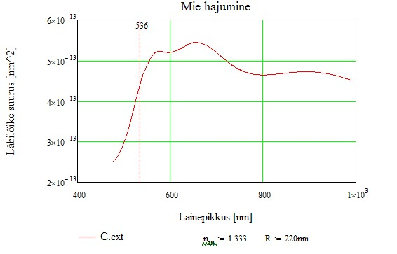 Pildil on modelleeritud raadiusega 220nm kullast nanosfääri mis paikneks vees ja vastavalt antud parameetritega leitud Mie hajumise spekter.